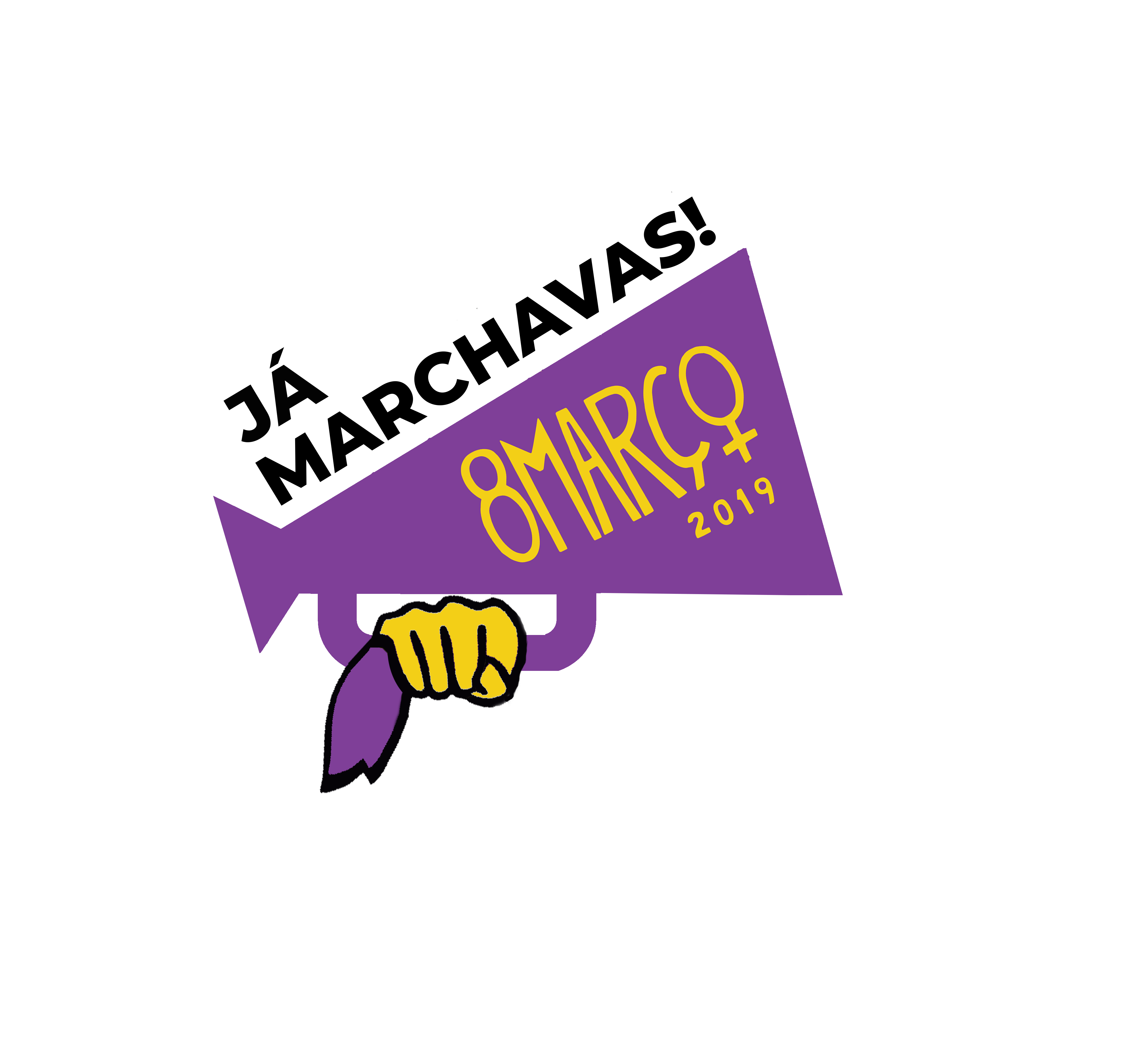 Logotipo da Greve Feminista (8M 2019)